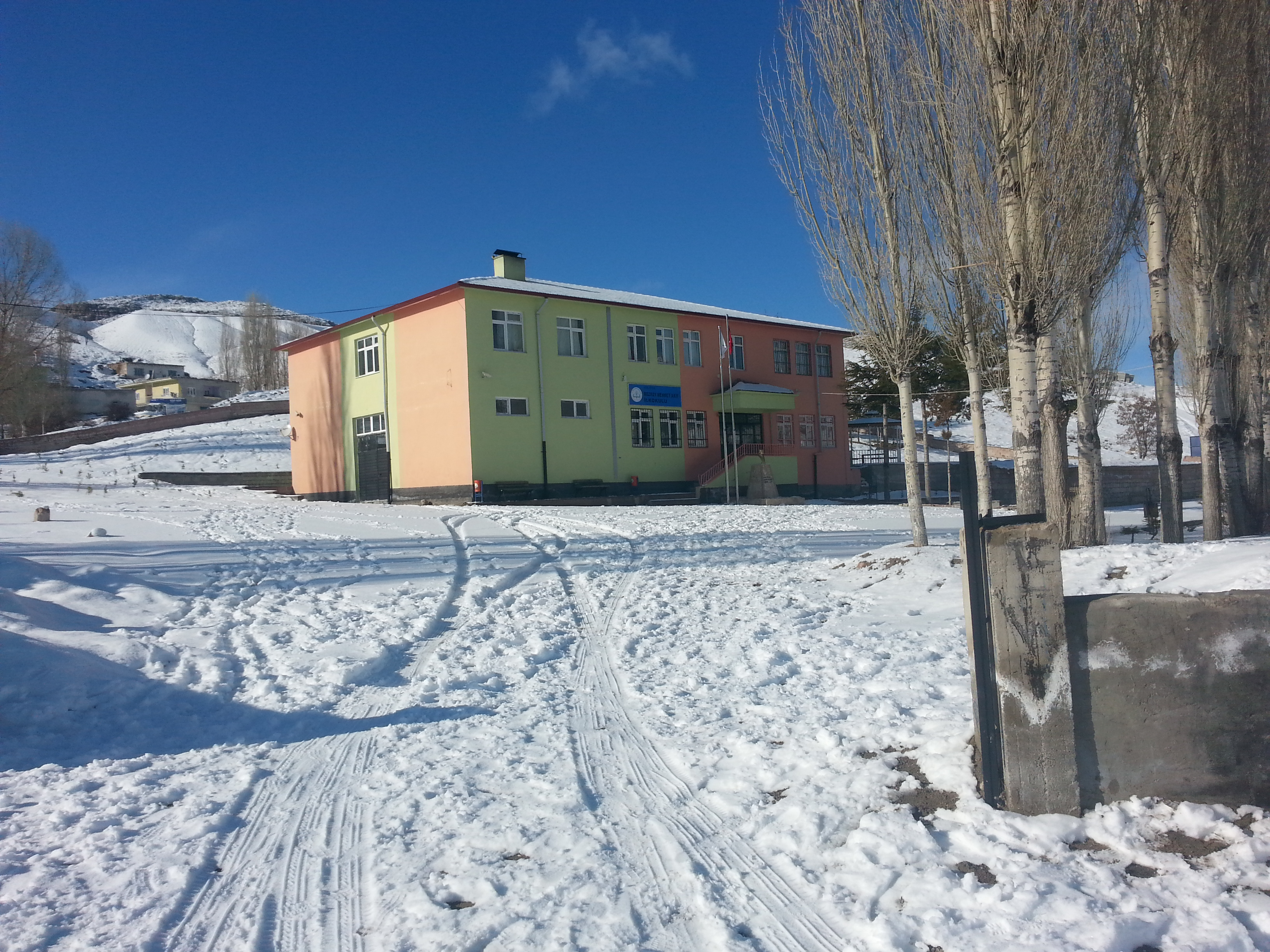 Bozköy Mehmet Akif İlokulu Genel Görünüm